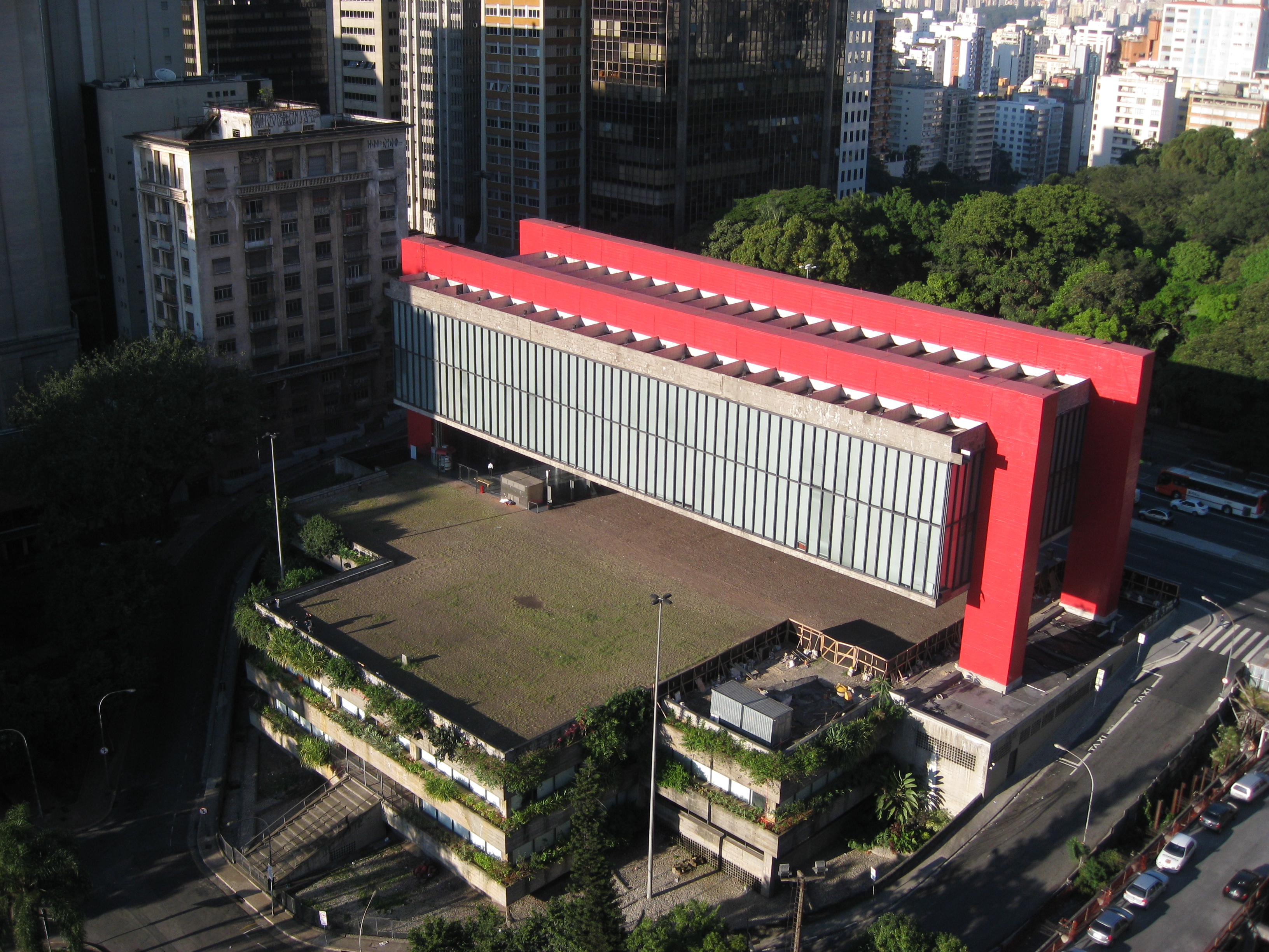 MASP, São Paulo